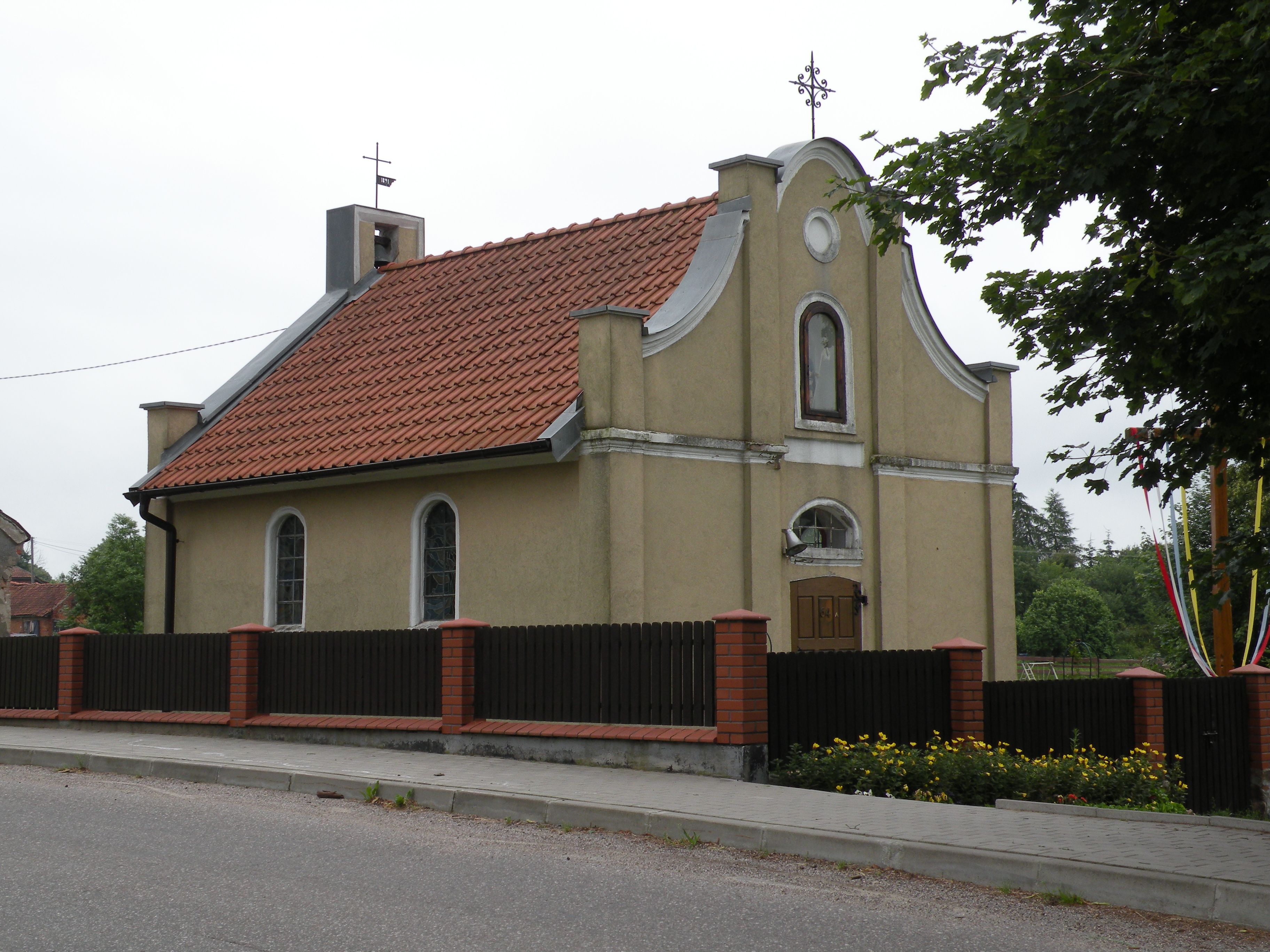 Bredynki 64a - kaplica filialna pw. św. Rocha, 1884 (zabytek nr A-4197 z 13.12.2000)